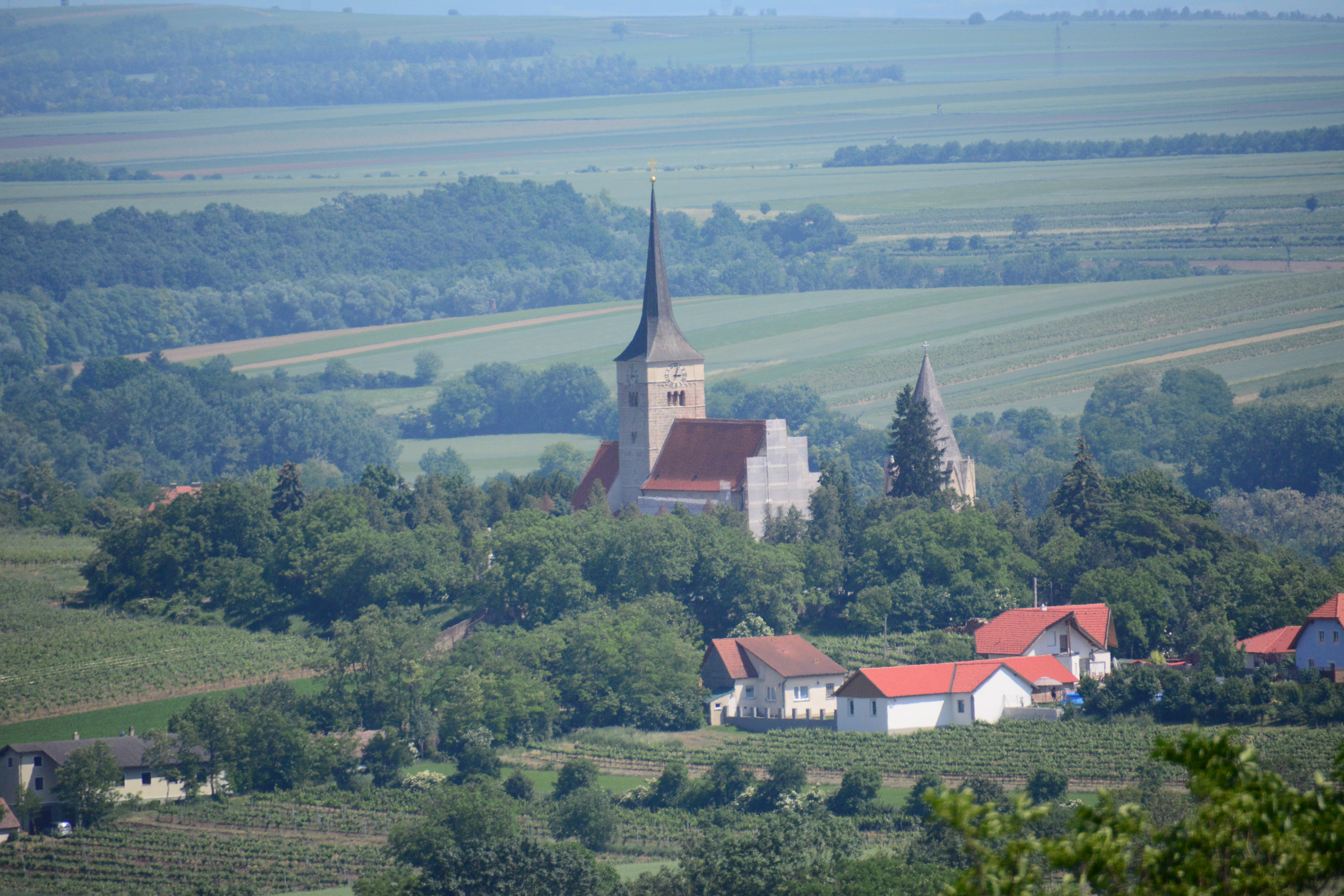 katholische Pfarrkirche heiliger Michael